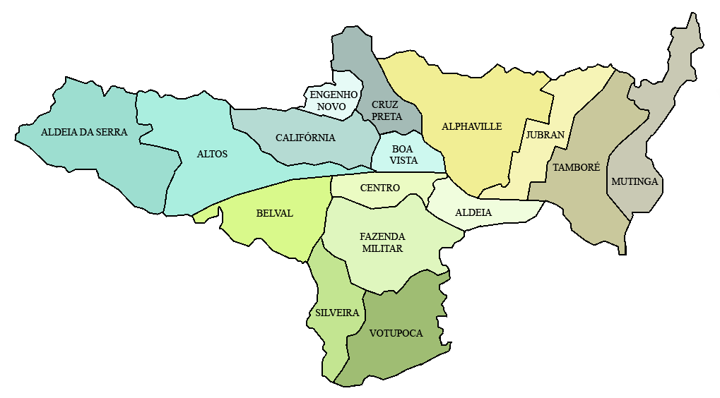 Mapa de Barueri, com divisão oficial de bairros.